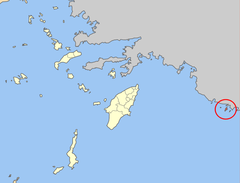 Locator map of Megisti (Kastelorizo) municipality (Δήμος Μεγίστης) in Dodecanese prefecture (Νομός Δωδεκανήσου) in Greece.